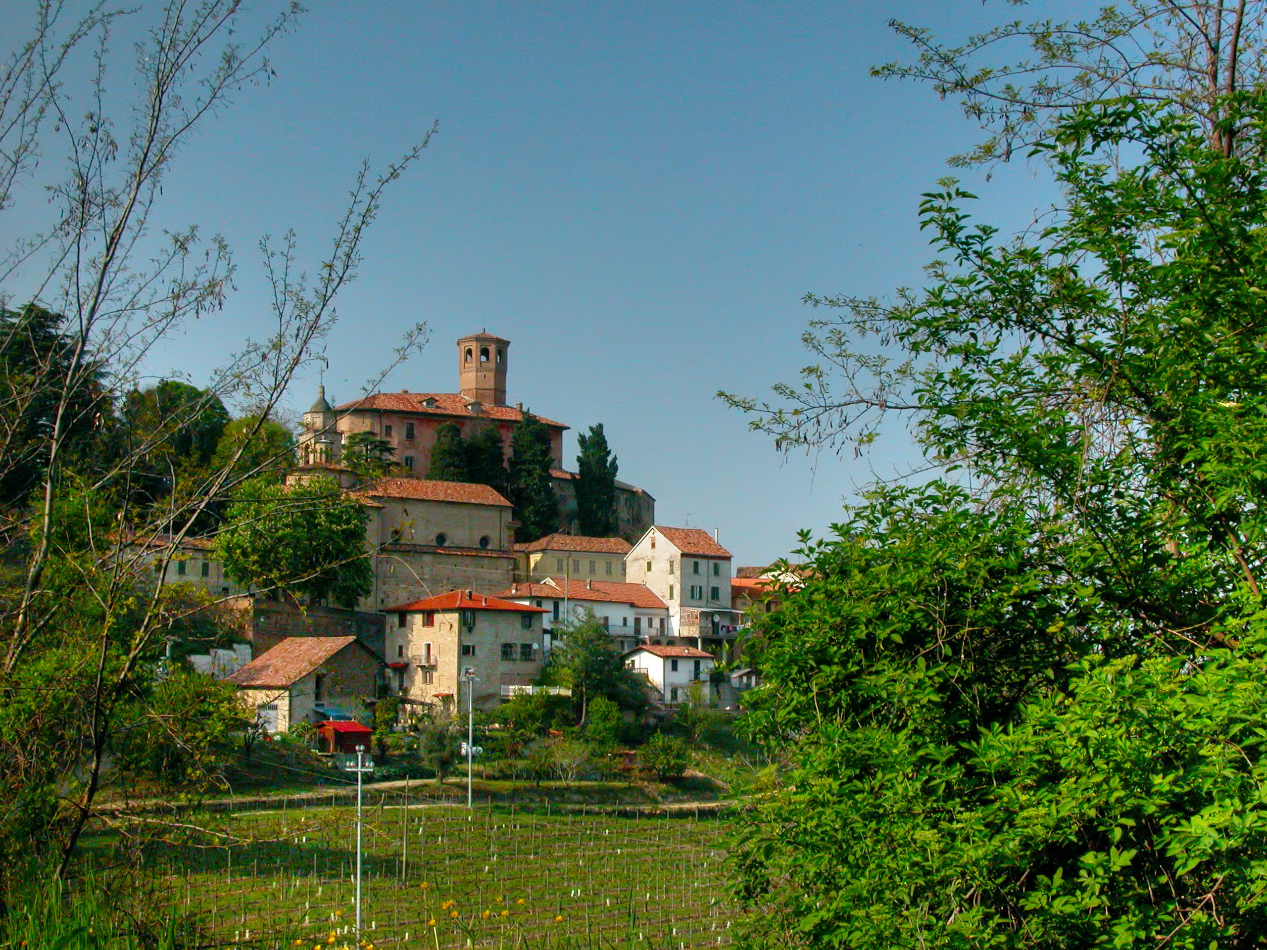 Calamandrana (Asti), Italy